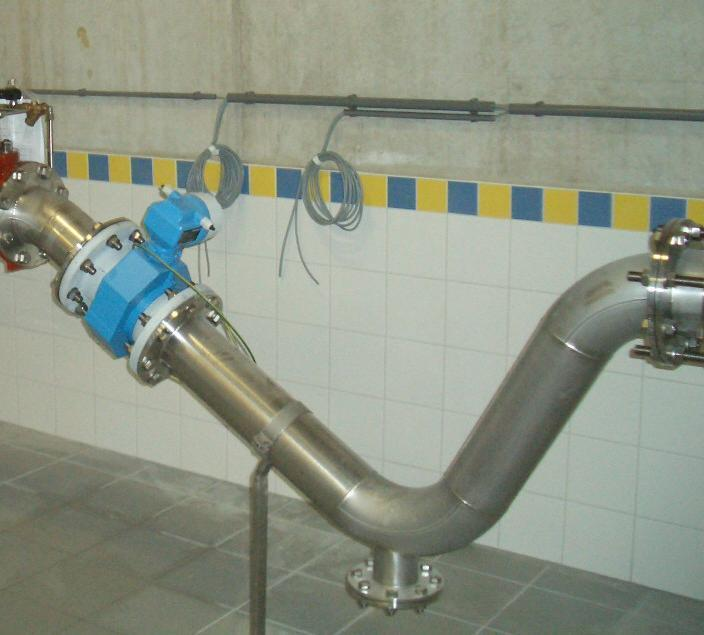 Ausschnitt Wasserwerk Einbaustelle MID